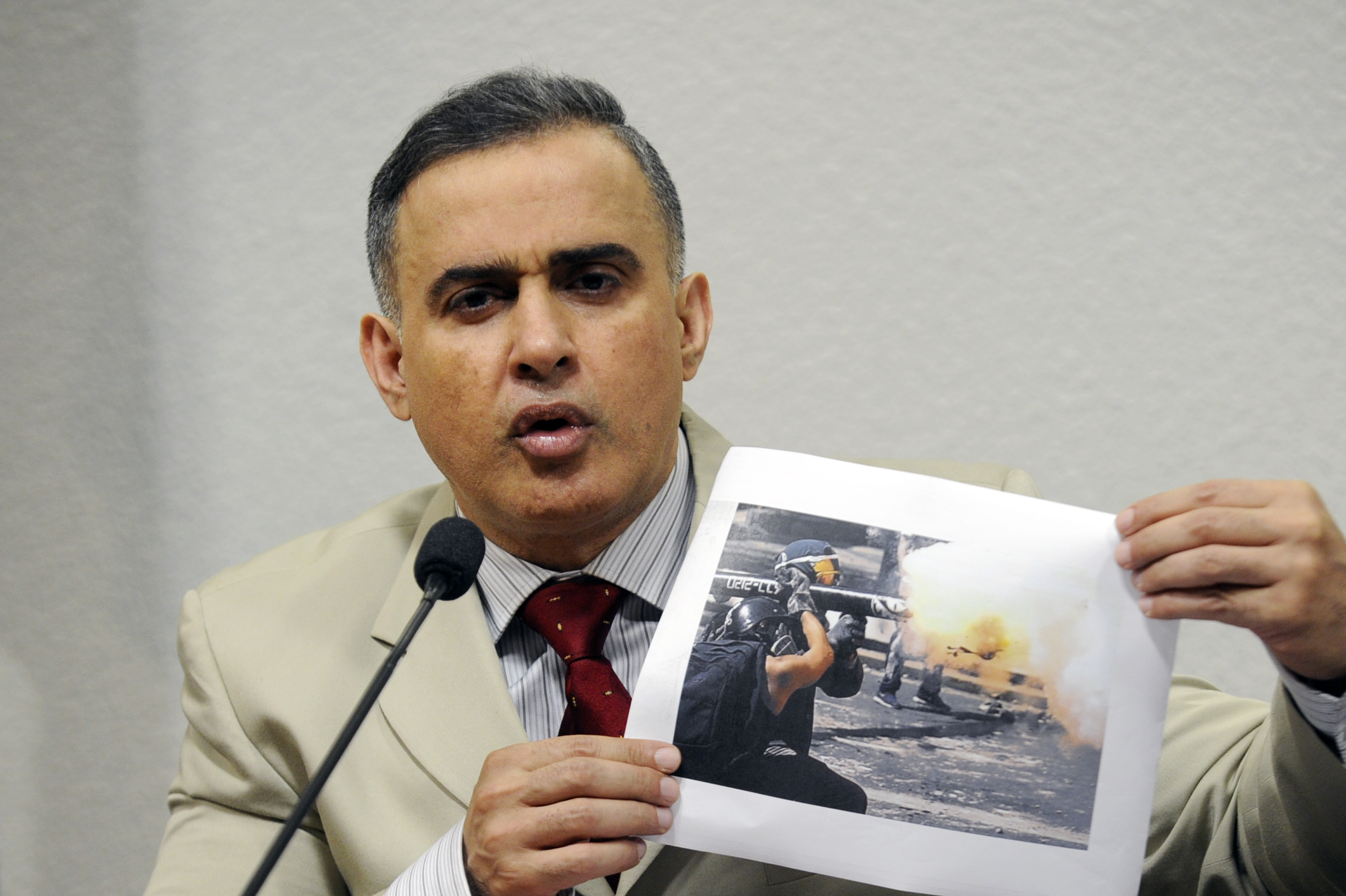 Sala de comissões do Senado durante a Comissão de Direitos Humanos e Legislação Participativa que realiza audiência pública interativa para ouvir Tarek William Saab, defensor Del Pueblo da Venezuela, com a finalidade de expor a situação dos direitos humanos naquele país. Em pronunciamento, defensor Del Pueblo da Venezuela, Tarek William Saab. Foto: Jefferson Rudy/Agência Senado